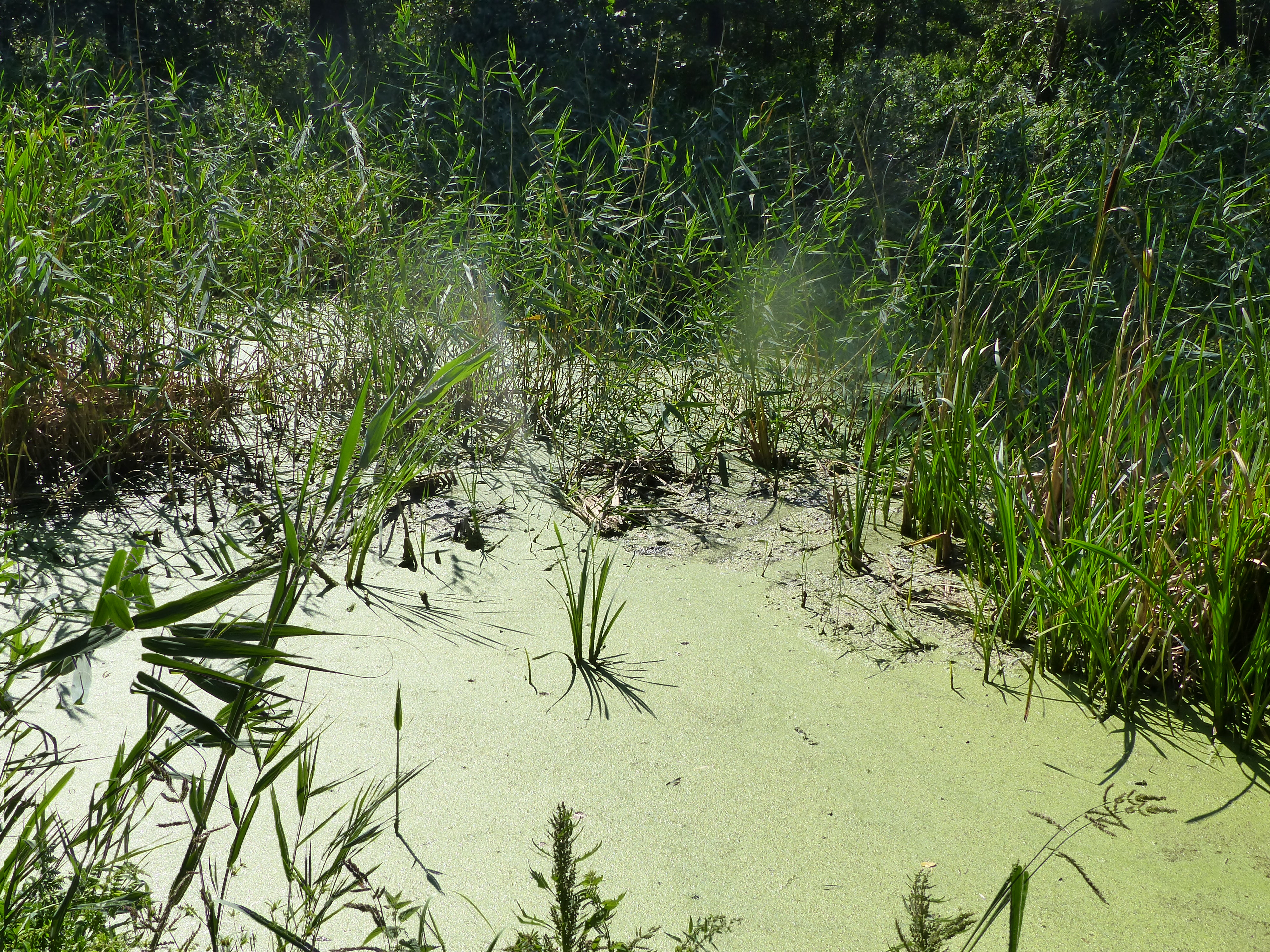 Békalencse. A felvétel a kónyi Tündértó mellett futó csatornánál készült 2017. szeptember 9-én.